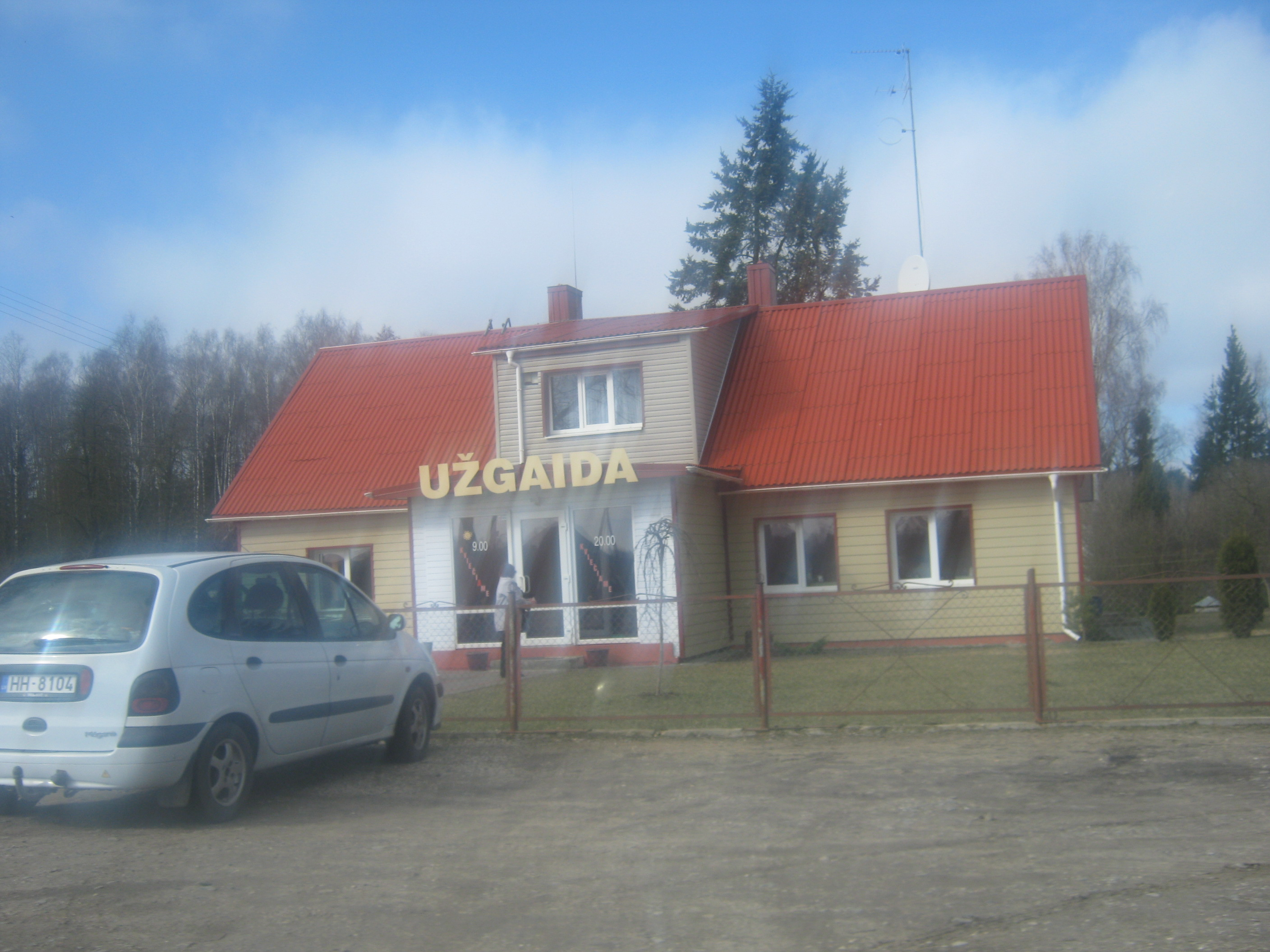 Ilgabradai, Jonavos raj.